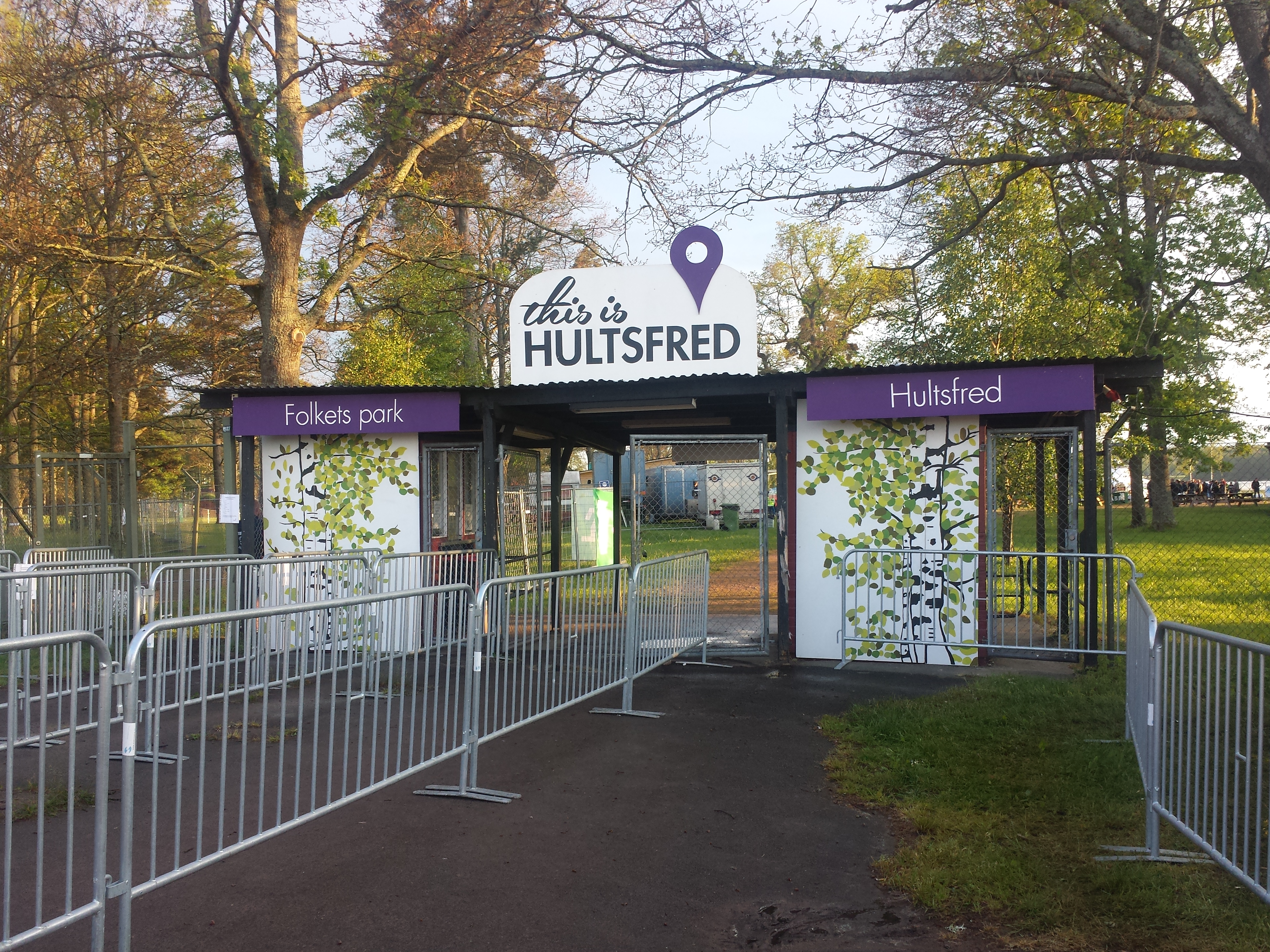 Huvudentrén till festivalområdet på festivalen This is Hultsfred.